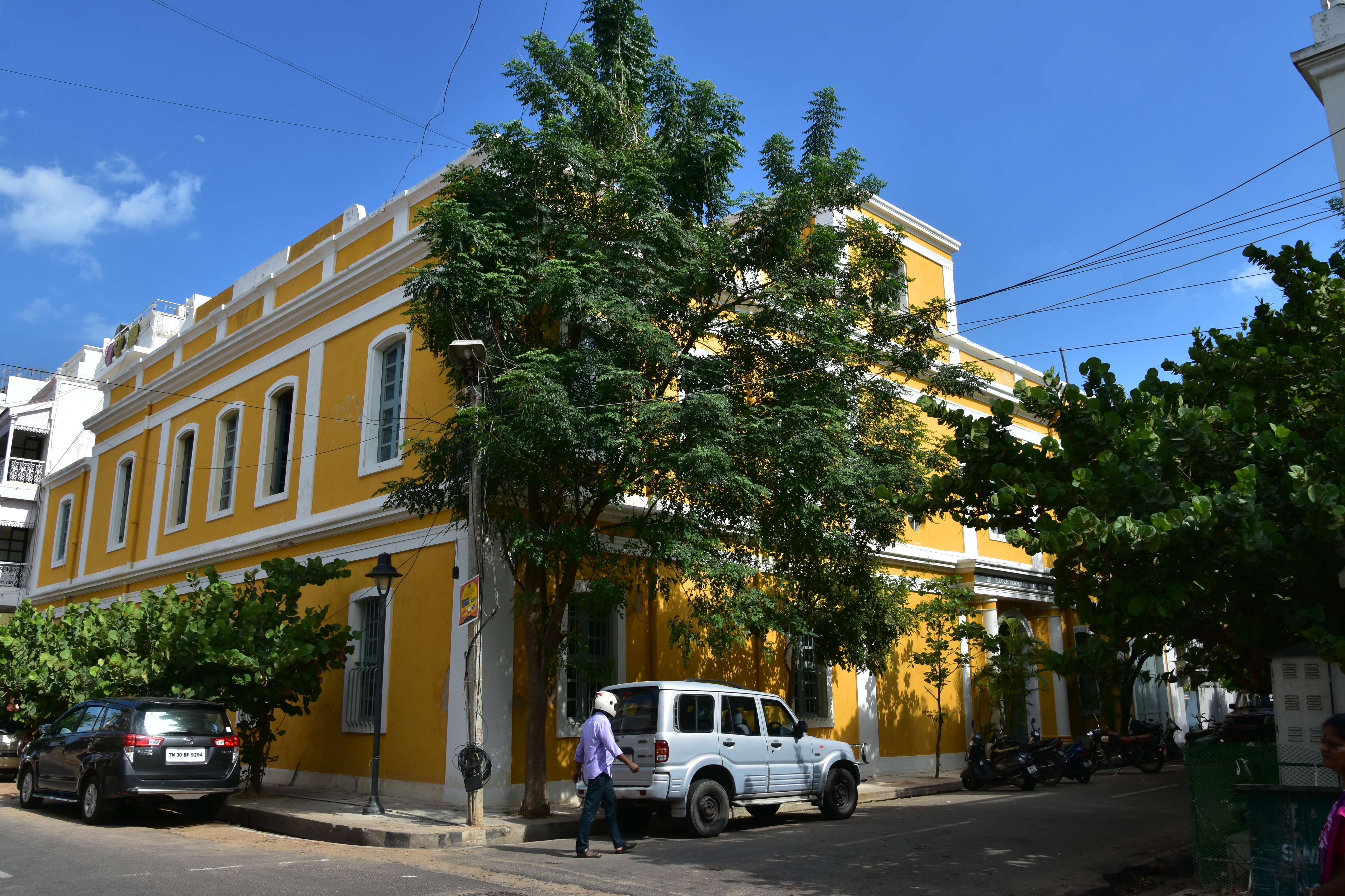 French Quarter, Pondicherry (15)